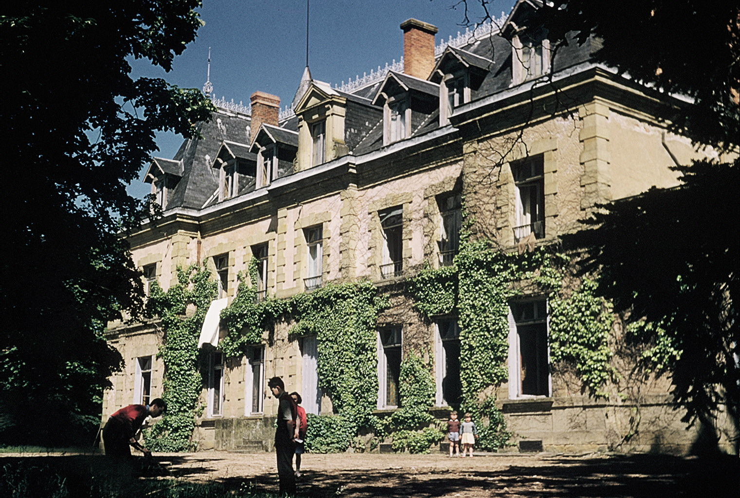 Facade arriere du chateau en 1958